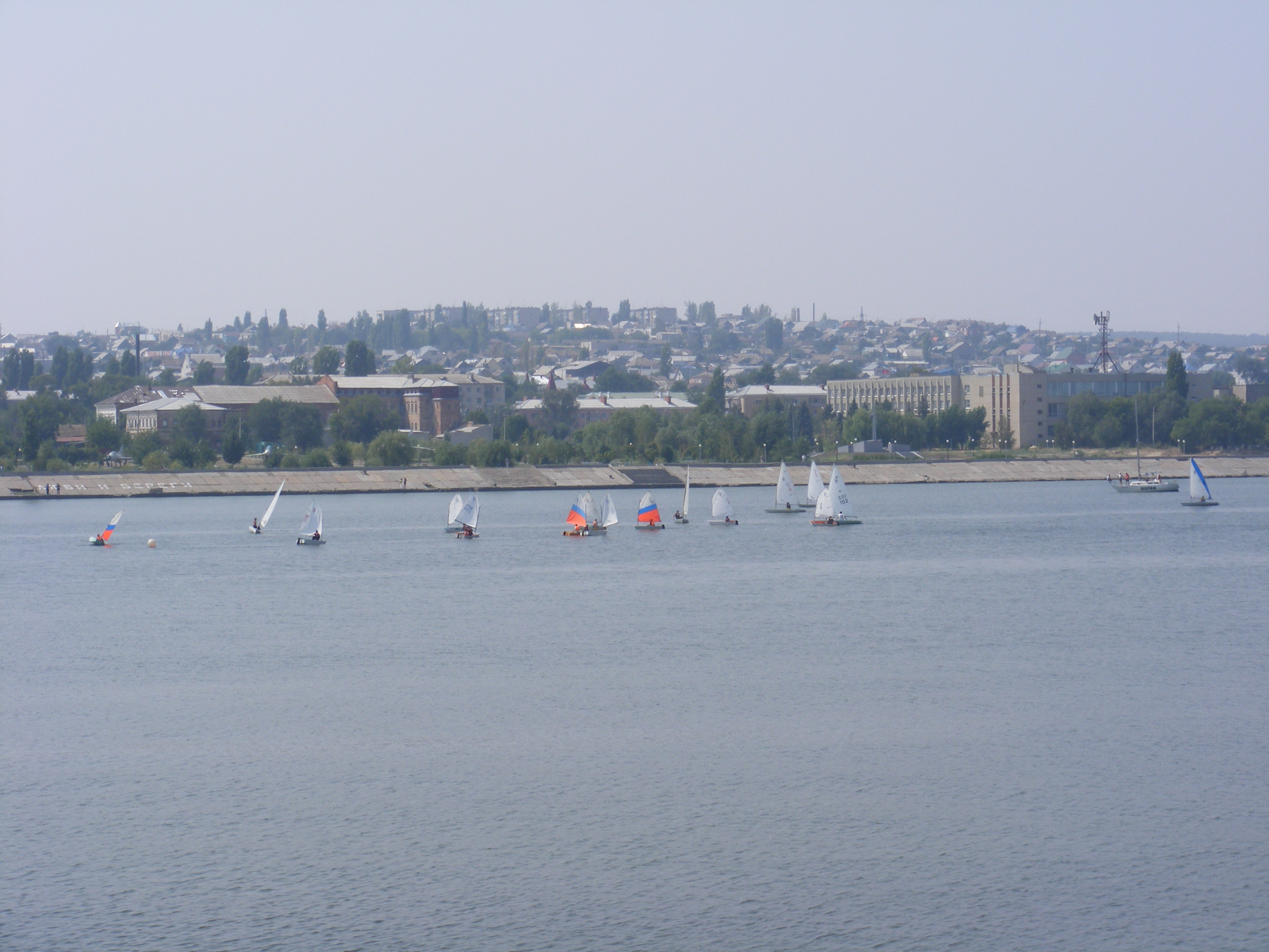 Вид на город Камышин со стороны Волгоградского водохранилища.